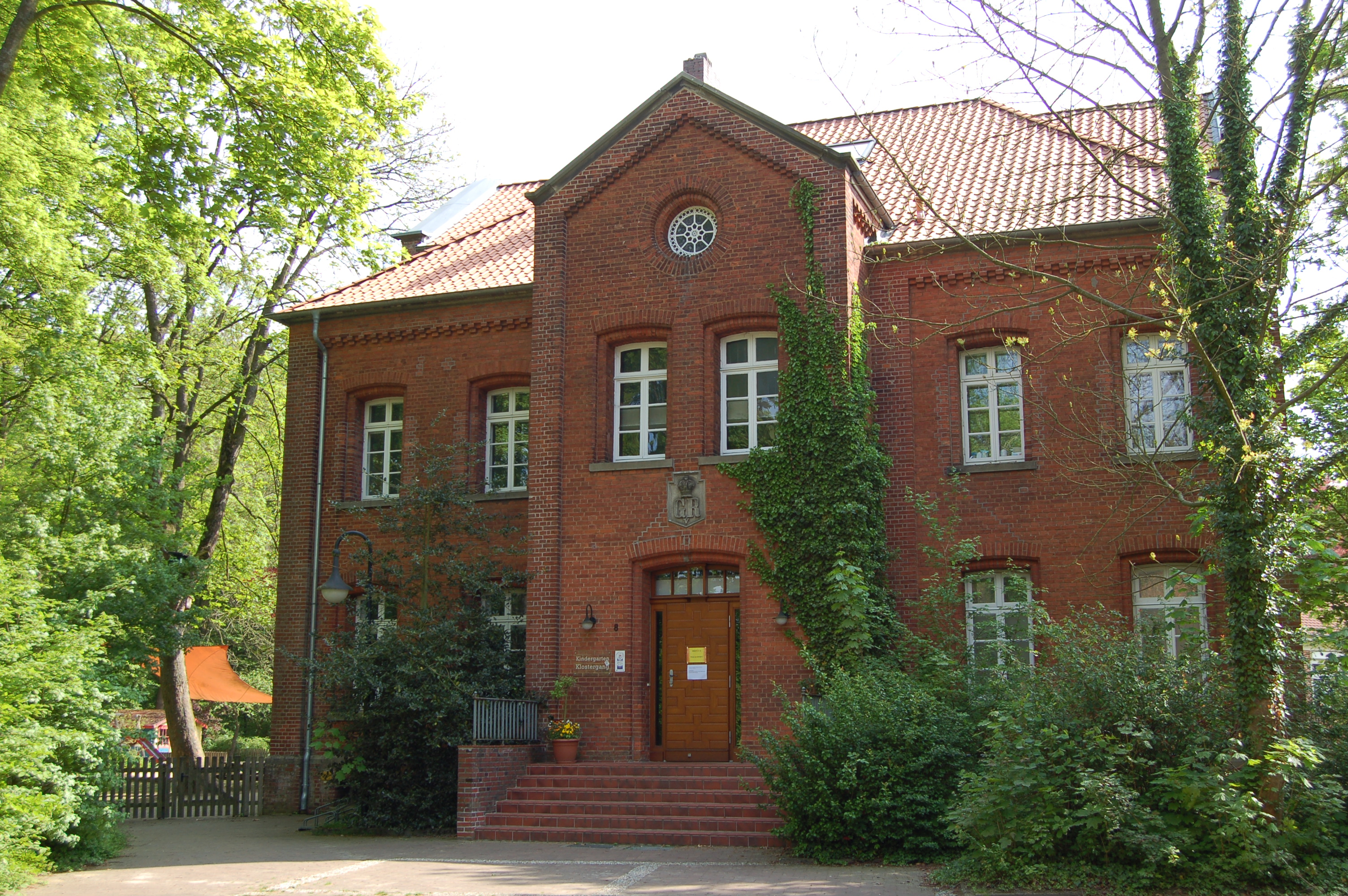 Haupteingang des alten Gefängnis in Zeven